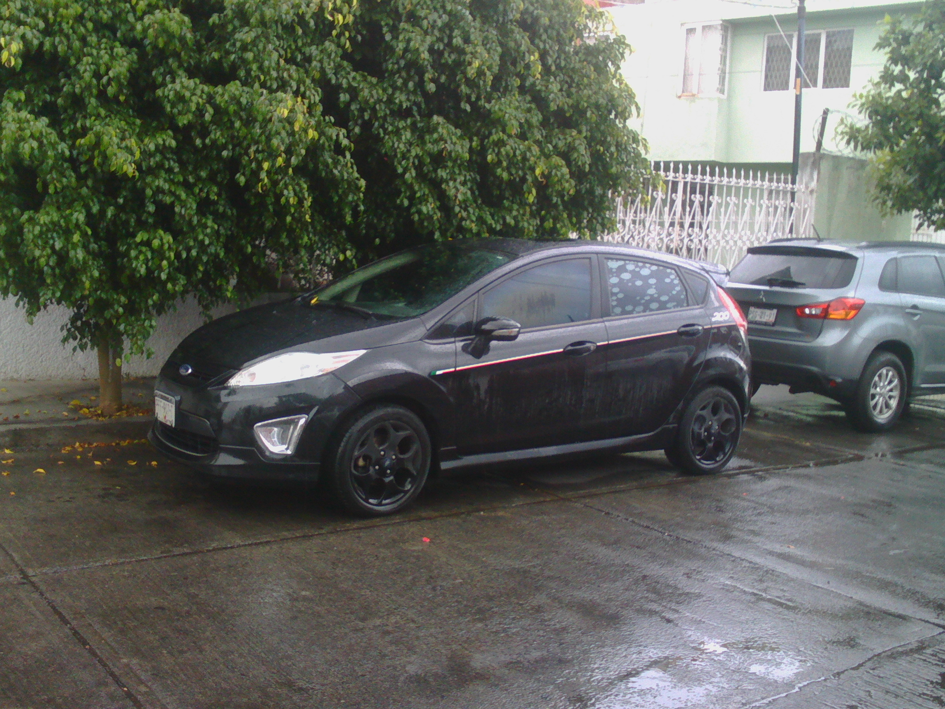 Edición especial bicentenario, solo 200 producidos, foto tomada en Morelia, Mich.